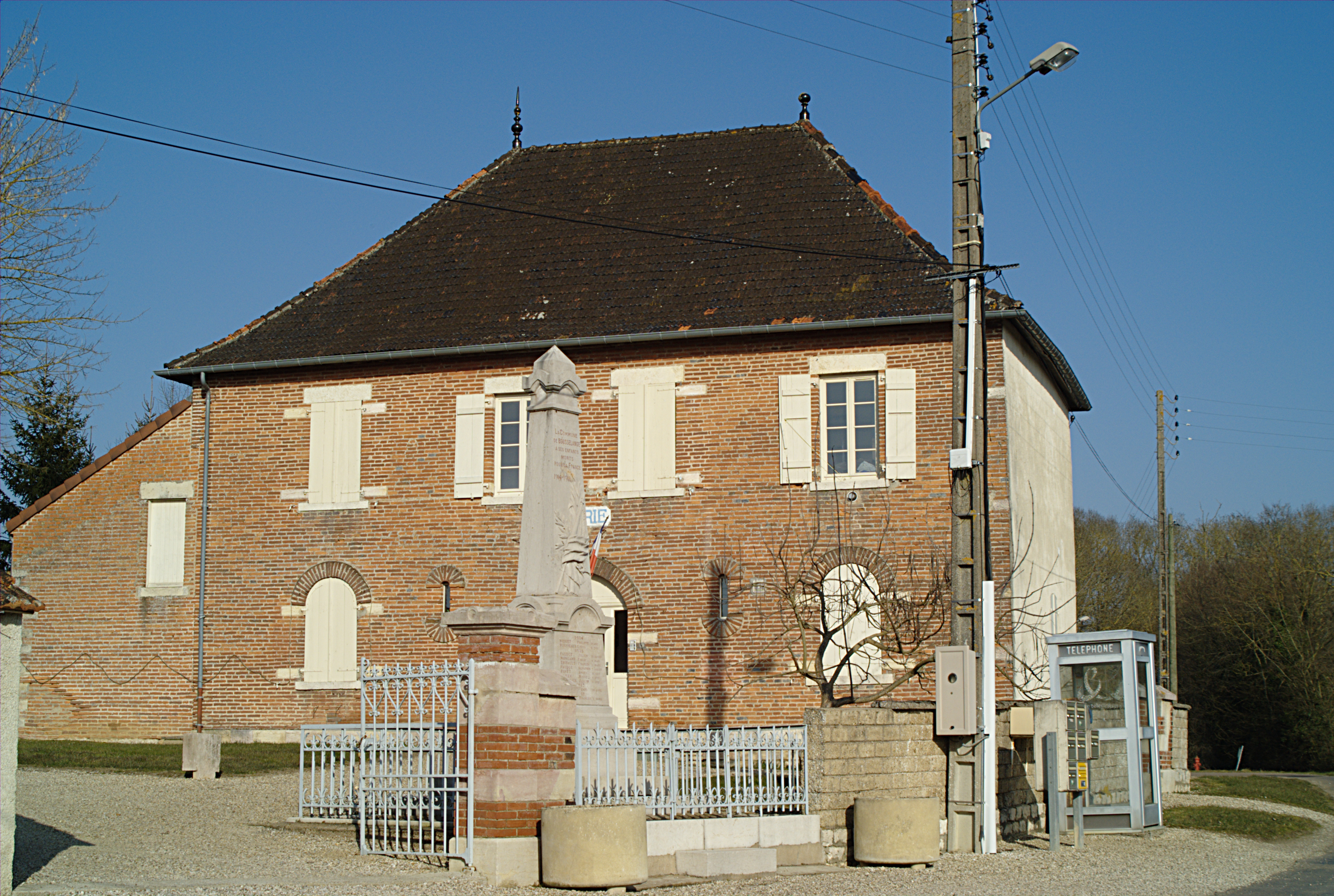 Mairie et Monument aux Morts, Bousselange (Côte d'Or, Bourgogne, France)